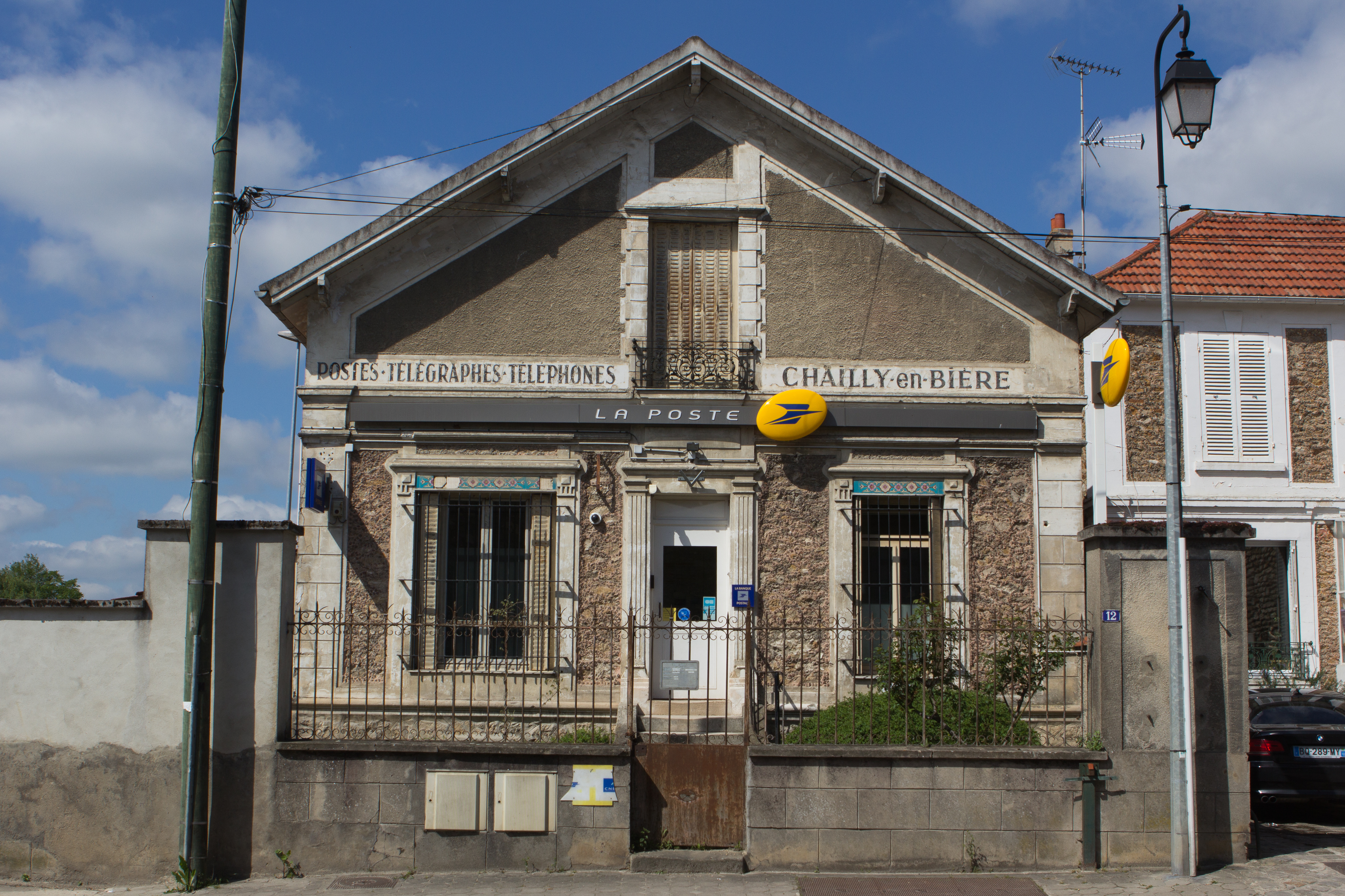 La poste de Chailly-en-Bière (Commune de Chailly-en-Bière, Seine-et-Marne, France)